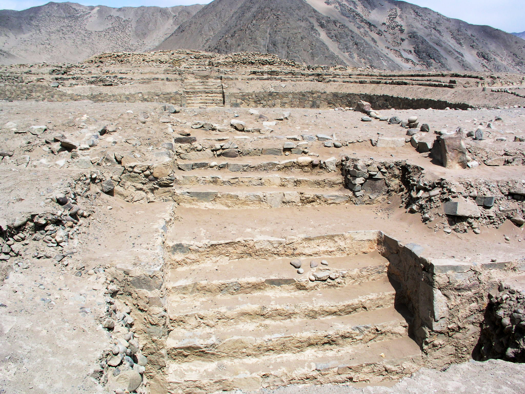 Pirámides en Caral, Valle de Supe, Region Lima, Peru.